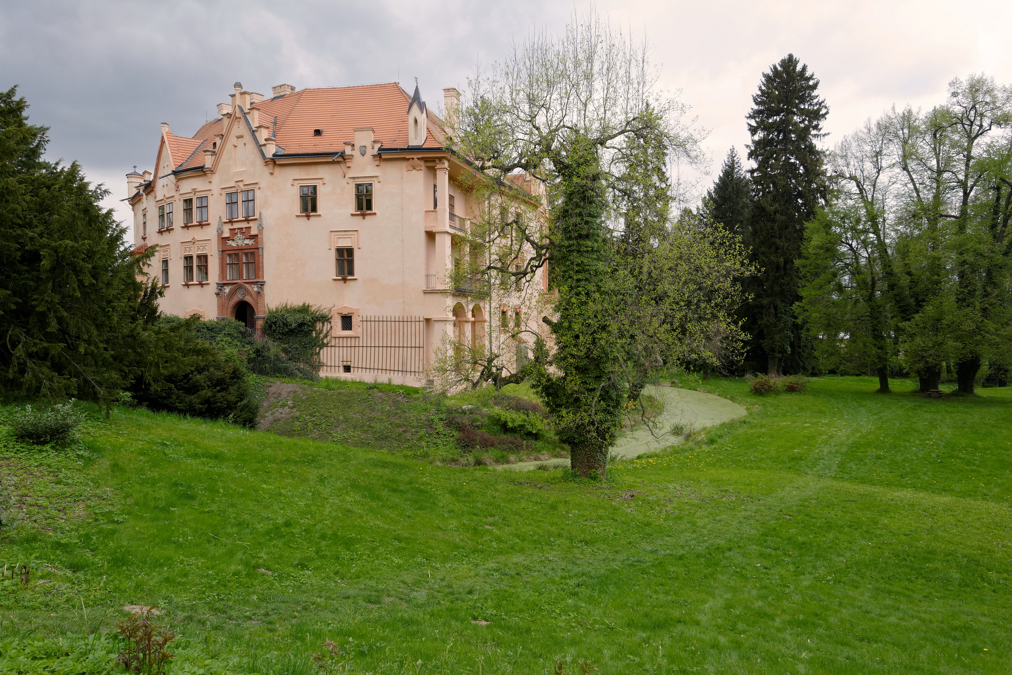 Vrchotovy Janovice, zámek, pohled od jihovýchodu.